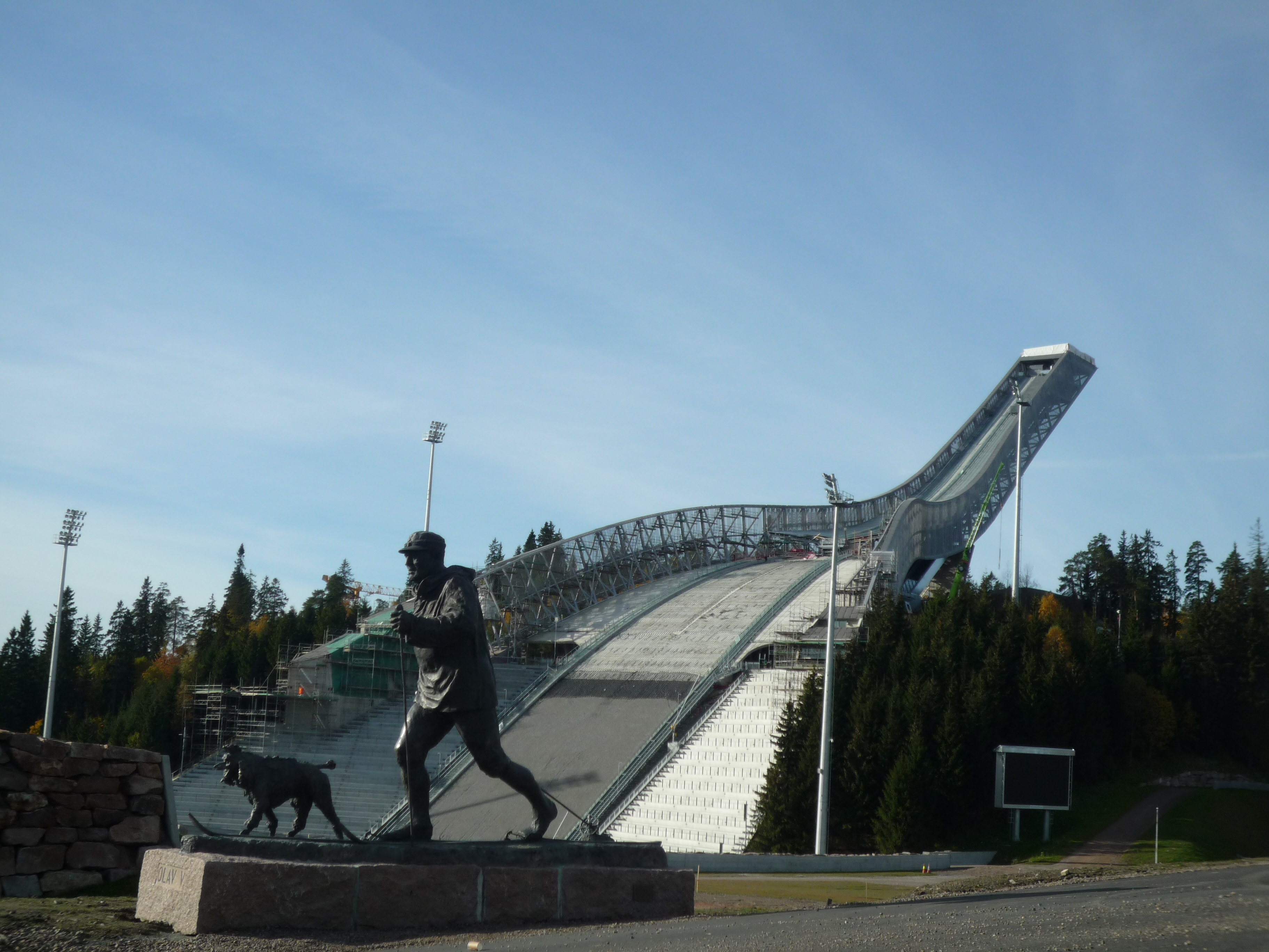 Лыжный трамплин Хольменколлена